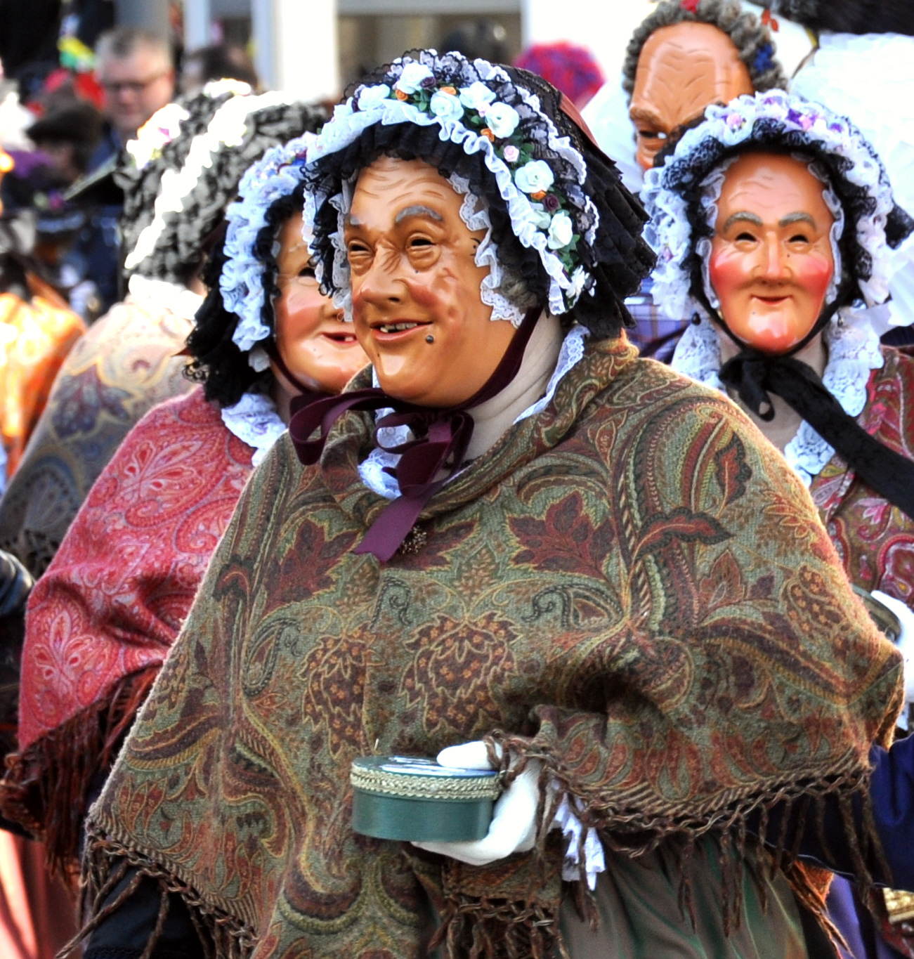 Fasnet in Villingen, Fasnetsmontag 2011 Narren der Narrozunft beim Maschgerelauf, Figur; „Morbele“